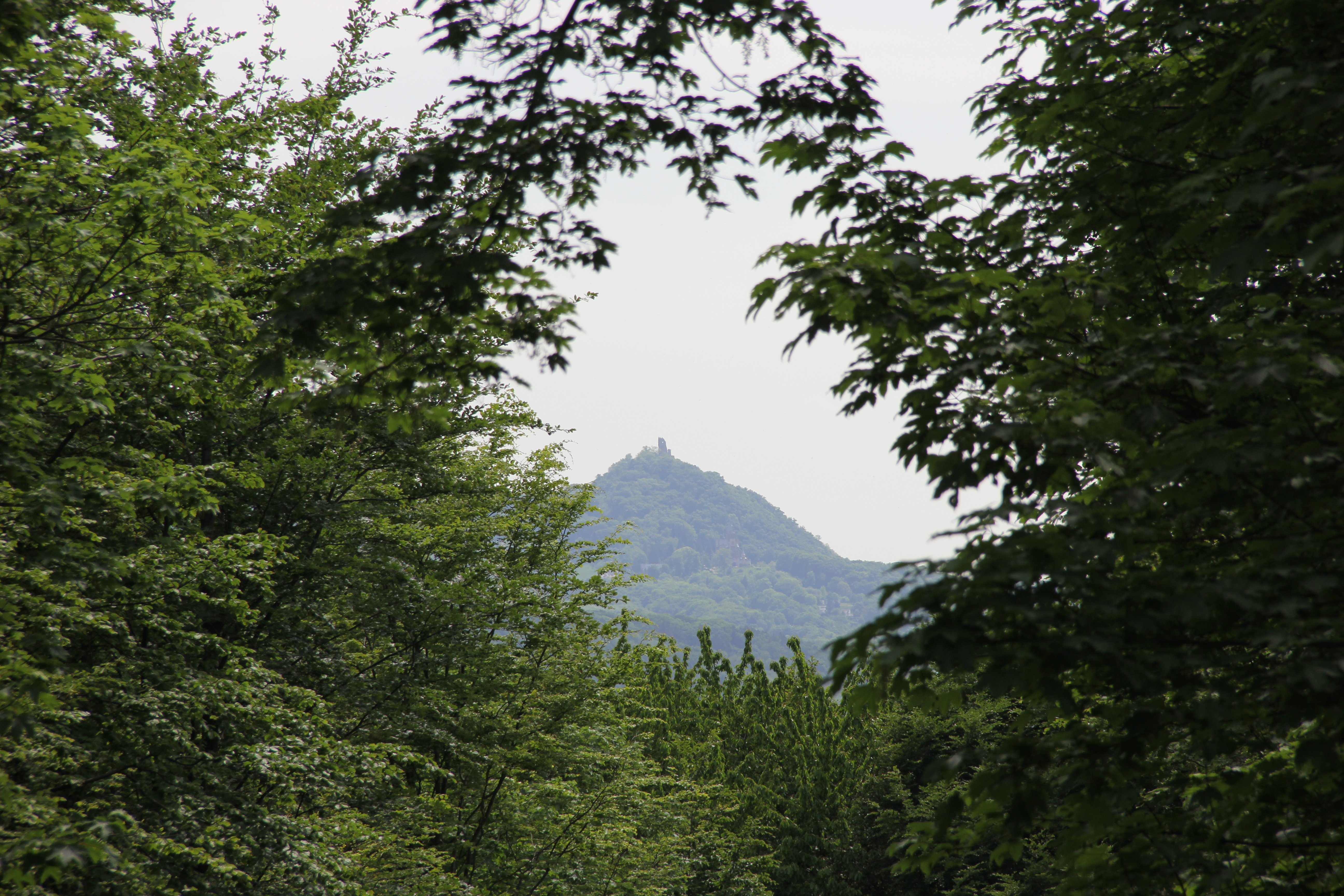 Foveaux-Häuschen im Küdinghovener Teil des Höhenzuges Ennert. Historische Sichtachse zum Drachenfels.